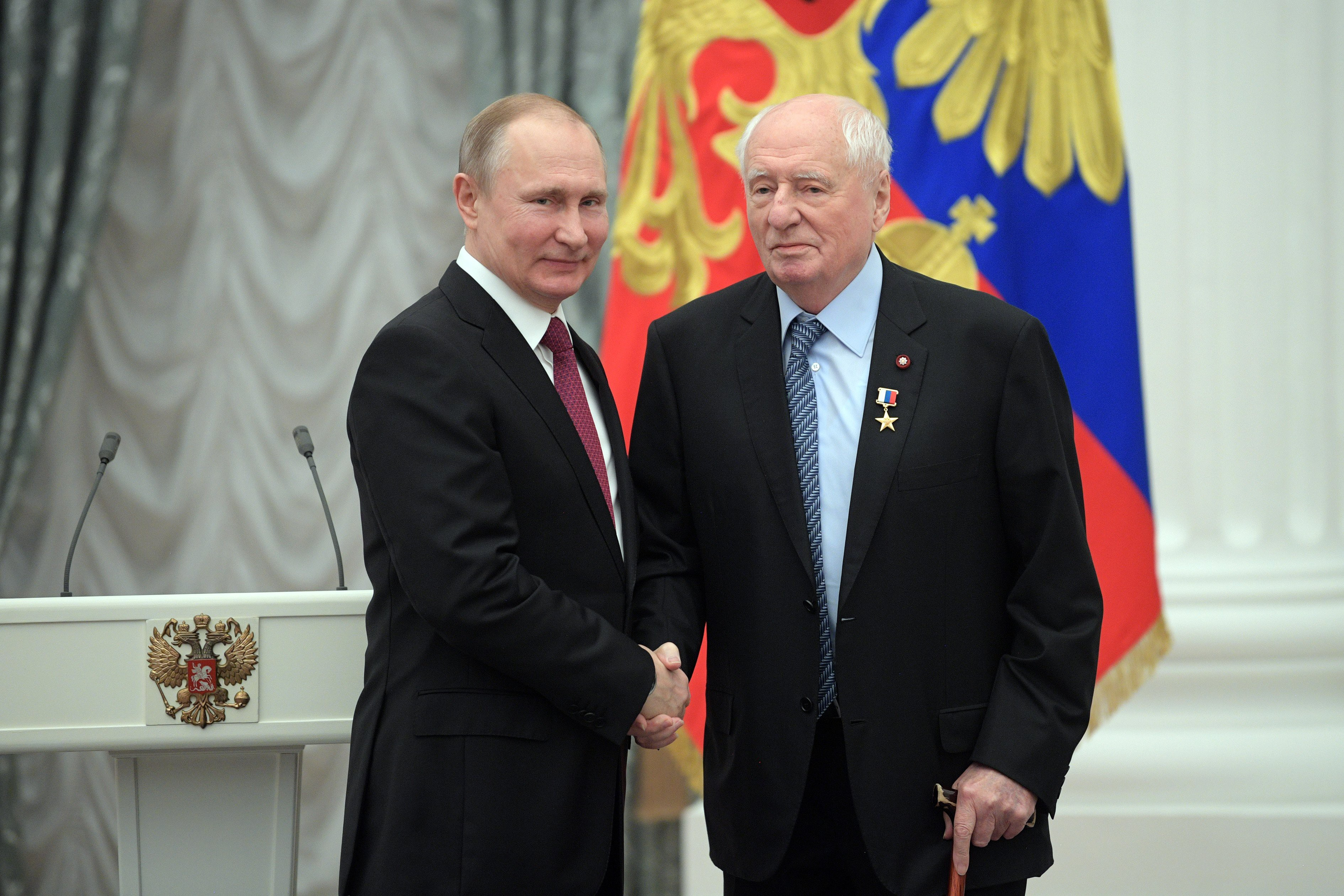 На церемонии награждения золотыми медалями «Герой Труда Российской Федерации». С художественным руководителем театра «Ленком» Марком Захаровым.